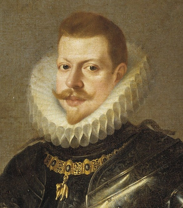 Retrato del rey Felipe III de España (1578-1621), que fue hijo del rey Felipe II de España.